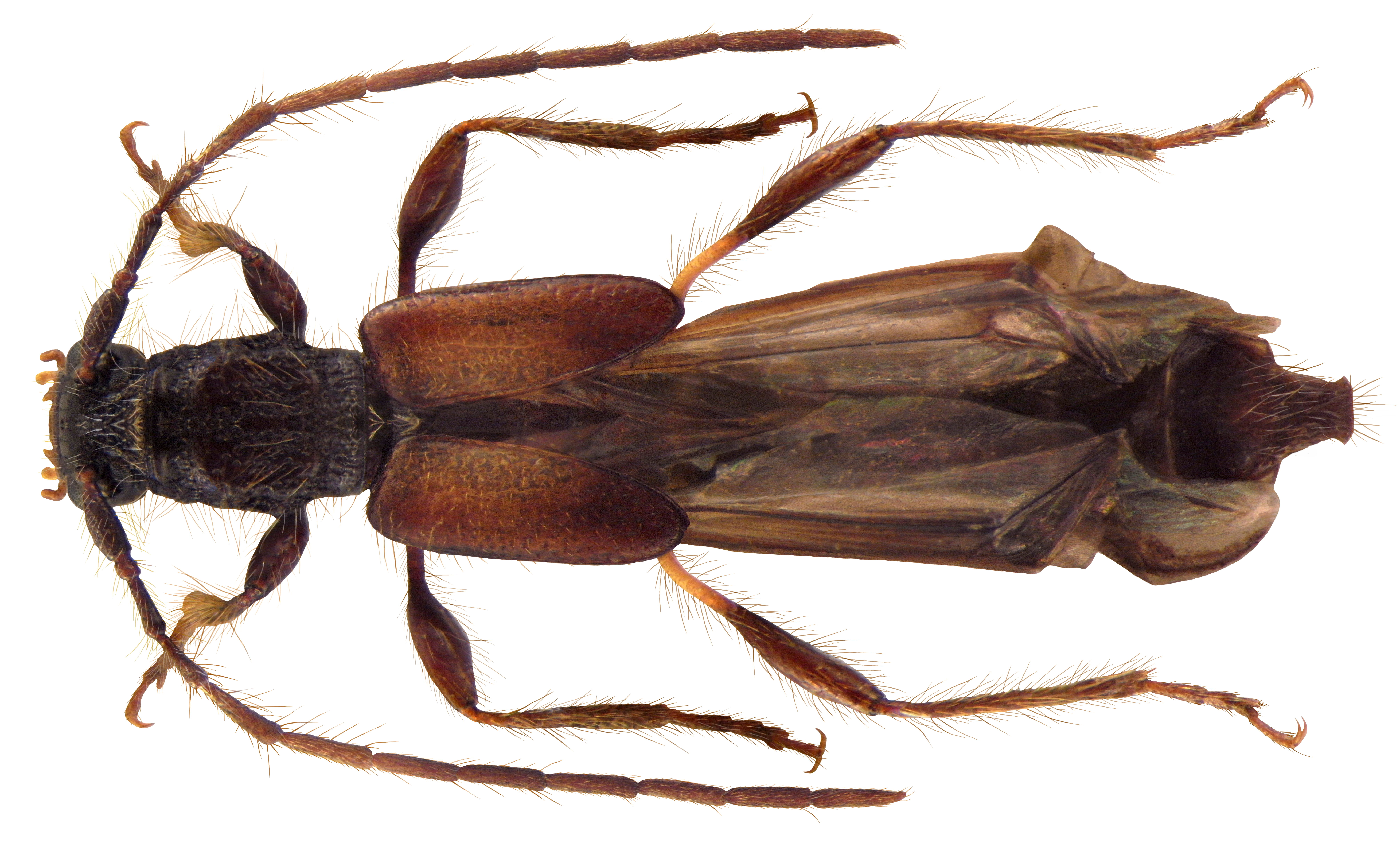 Familie: Cerambycidae Groesse: 5-8 mm Verbreitung: Europa Ökologie: Entwicklung in Rosaceen Fundort: Germania, Thüringen, Reichstädt leg.det. A.Weigel, 2009 Photo: U.Schmidt, 2010